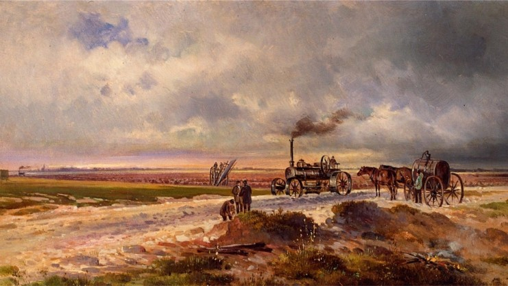 Dampfpflug von John Fowler im Einsatz auf dem Hümmling im Emsland.